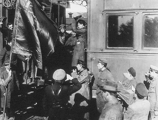 Leon Trotsky's Armored Train